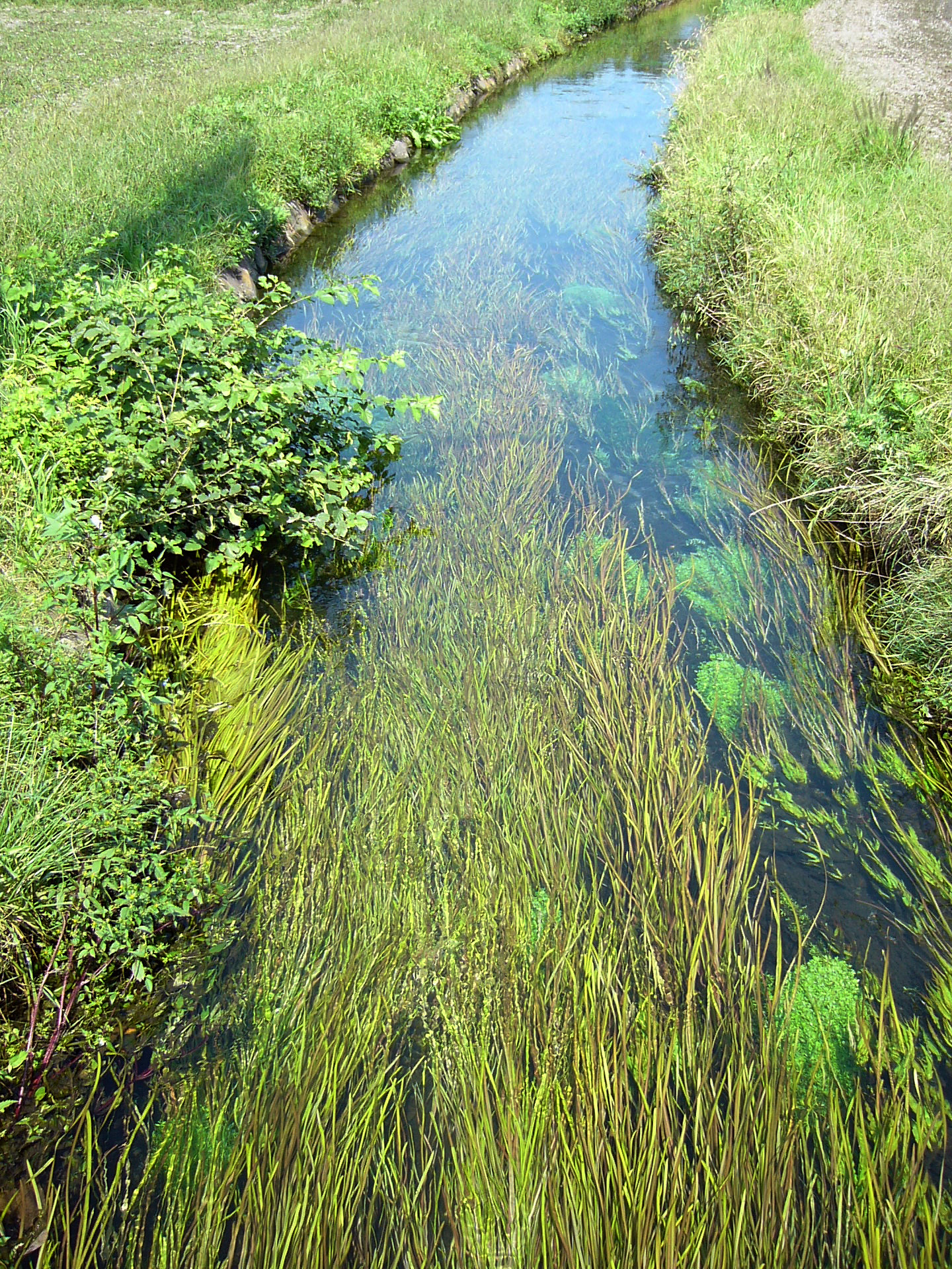 Azumino, Nagano, Japan